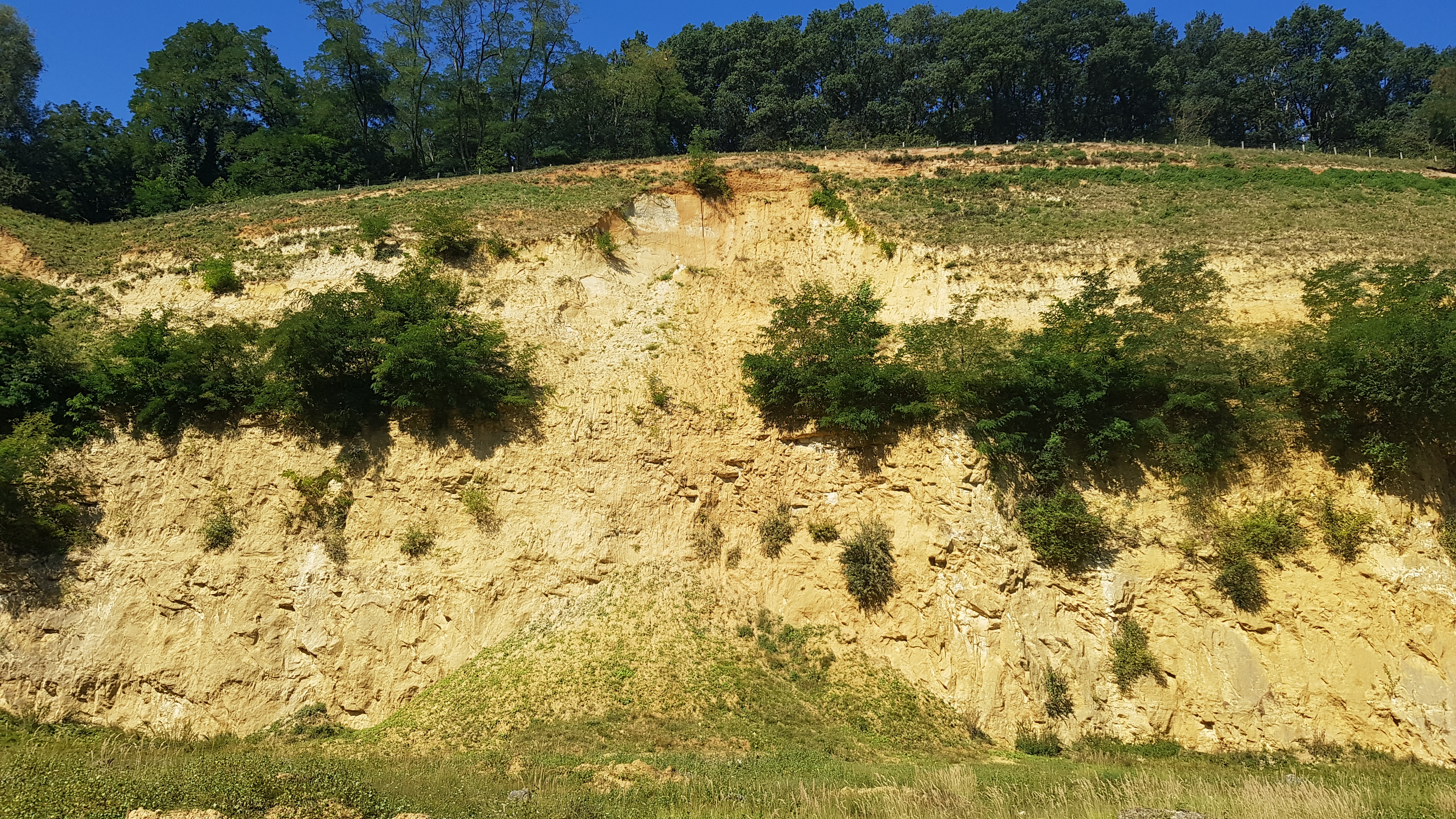 Curfsgroeve, Geulhem, Nederland